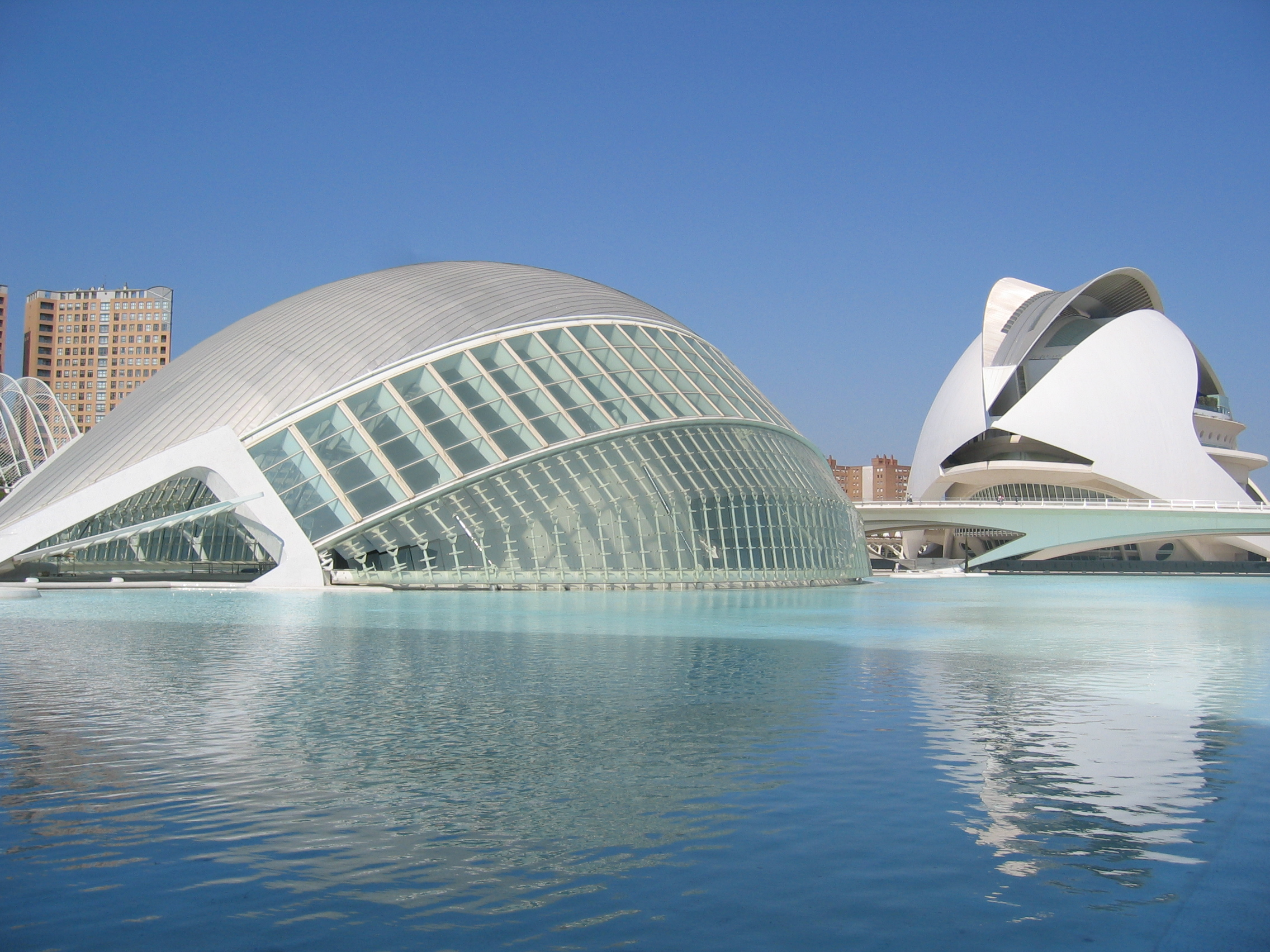 Hemisfèric i Ciutat de les Arts